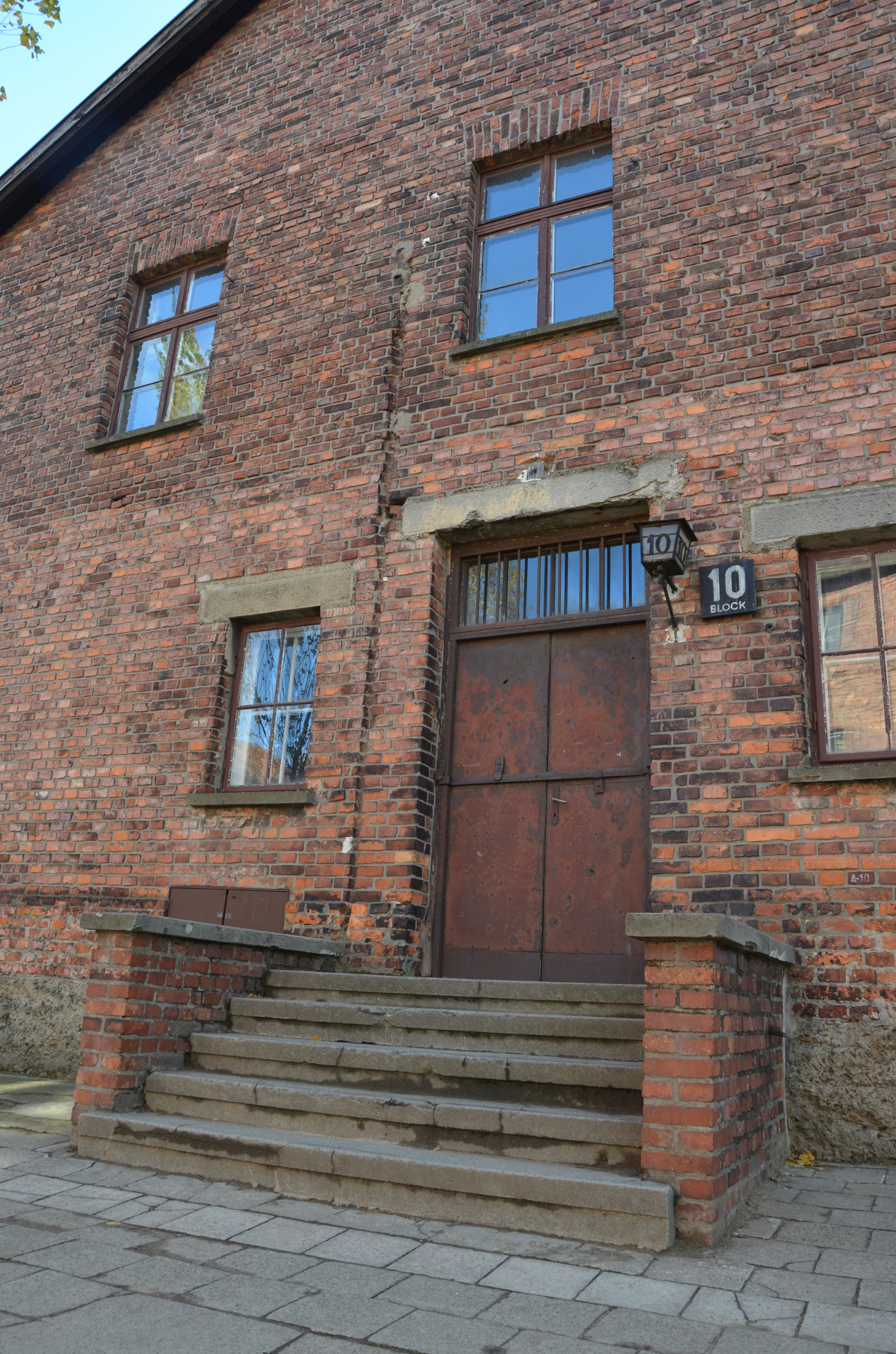 Barak 10 op het terrein van Auschwitz I.